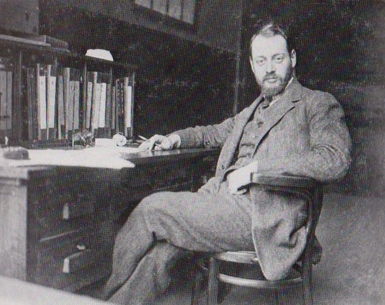 Ernst Hijmans in het Central Normalisatie Bureau, 1920